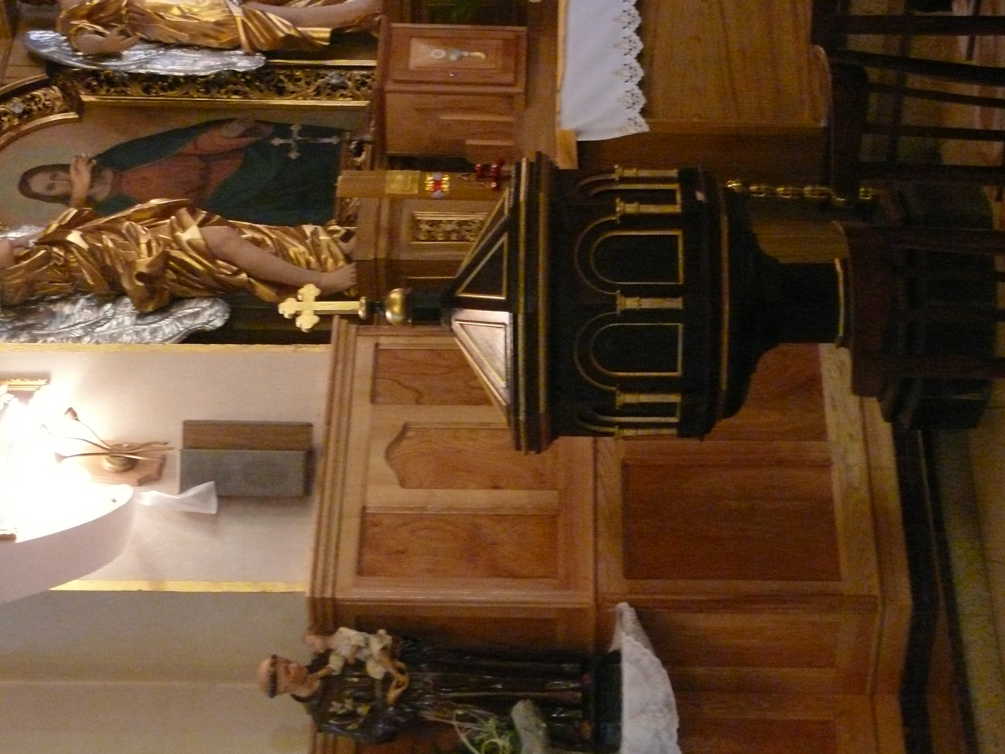 chrzcielnica w kościele parafialnym w Birczy, województwo podkarpackie